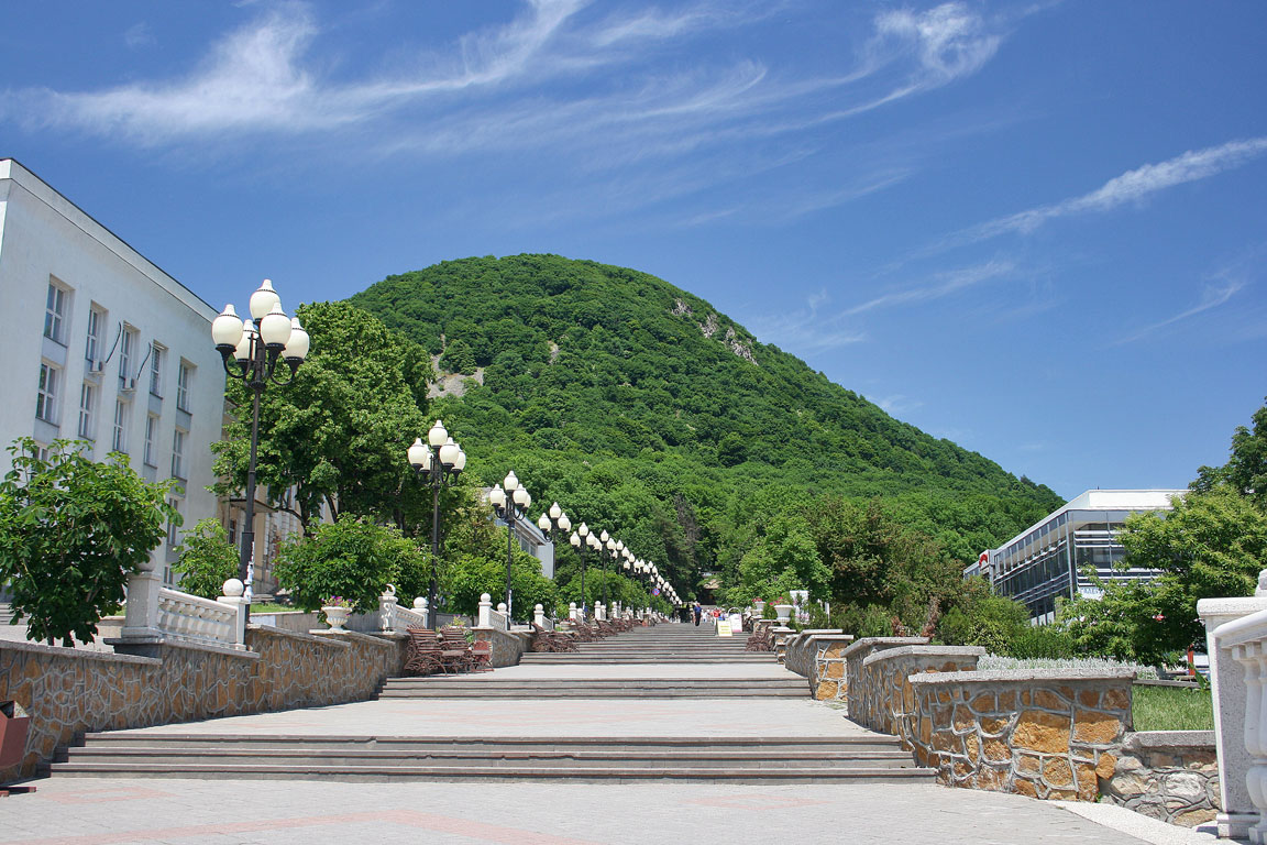 Гора Железная. Лестница к Лечебному парку